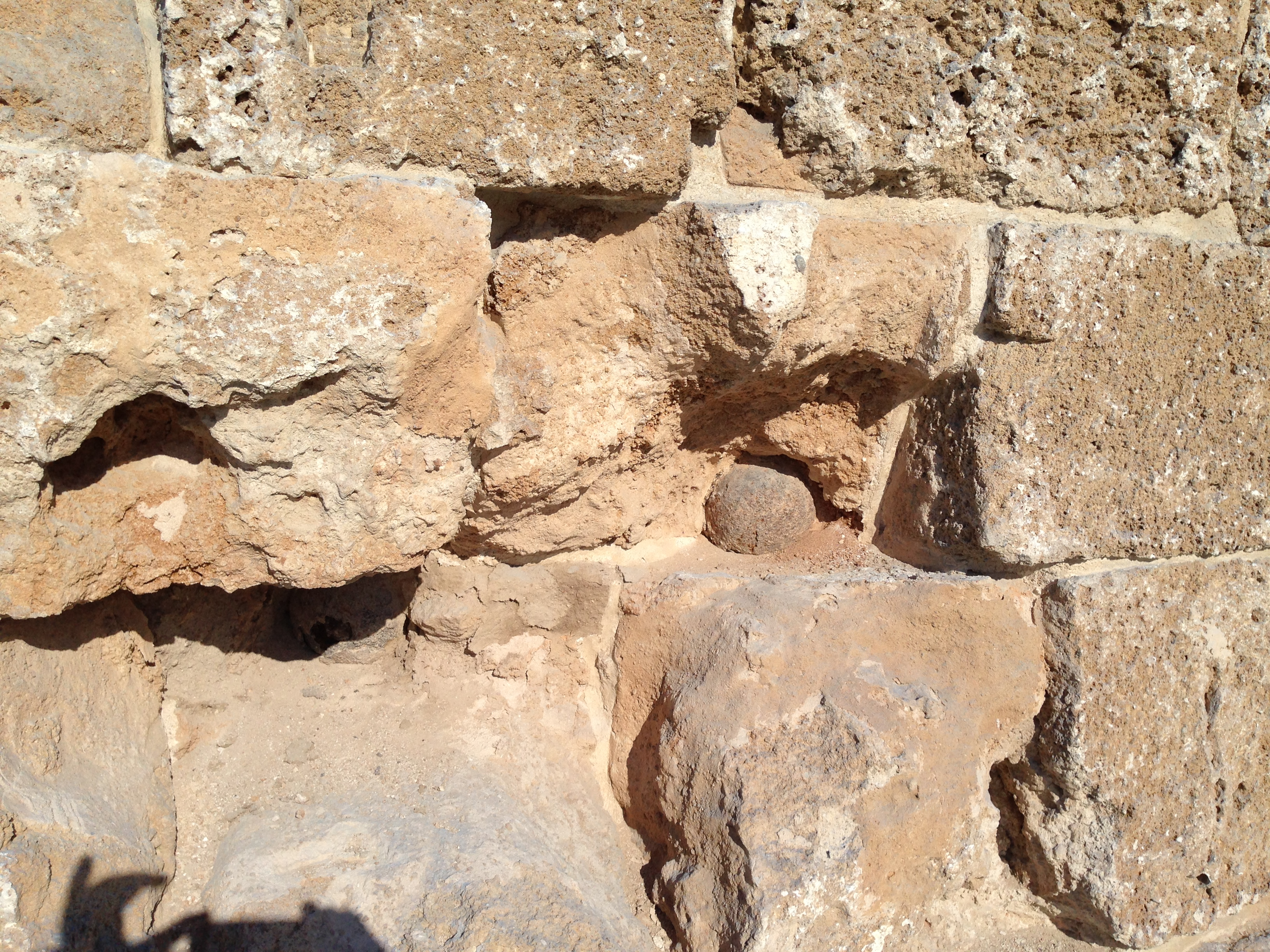 שרידי כדורי תותח מהפגזת עכו בשנת 1840 על ידי הצי הבריטי שרידי כדורי תותח התגלו בתוך הקיר על ידי ארכאולוגים, והם זוהו כשייכים להפגזה בשנת 1840 הכדורים נמצאו בקיר החומה של מסגד אל שאזליה שבצידו השני נמצאים אולמות האבירים